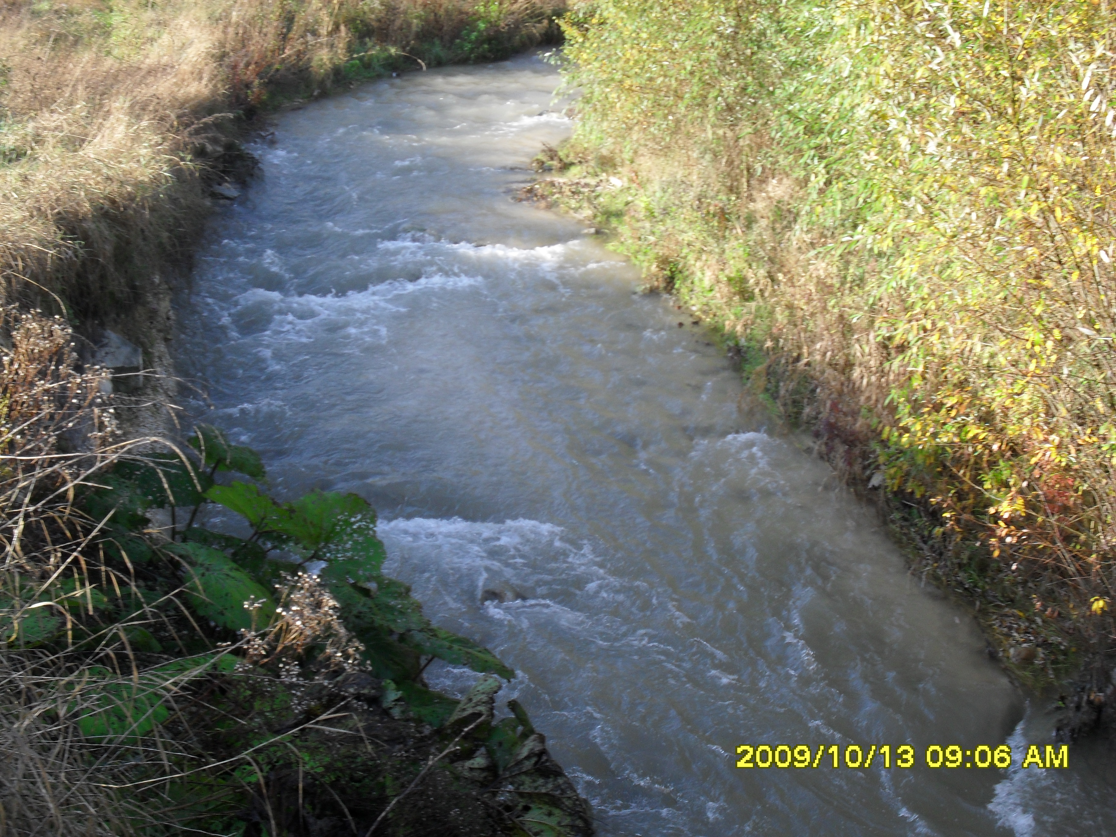 Река Джуца